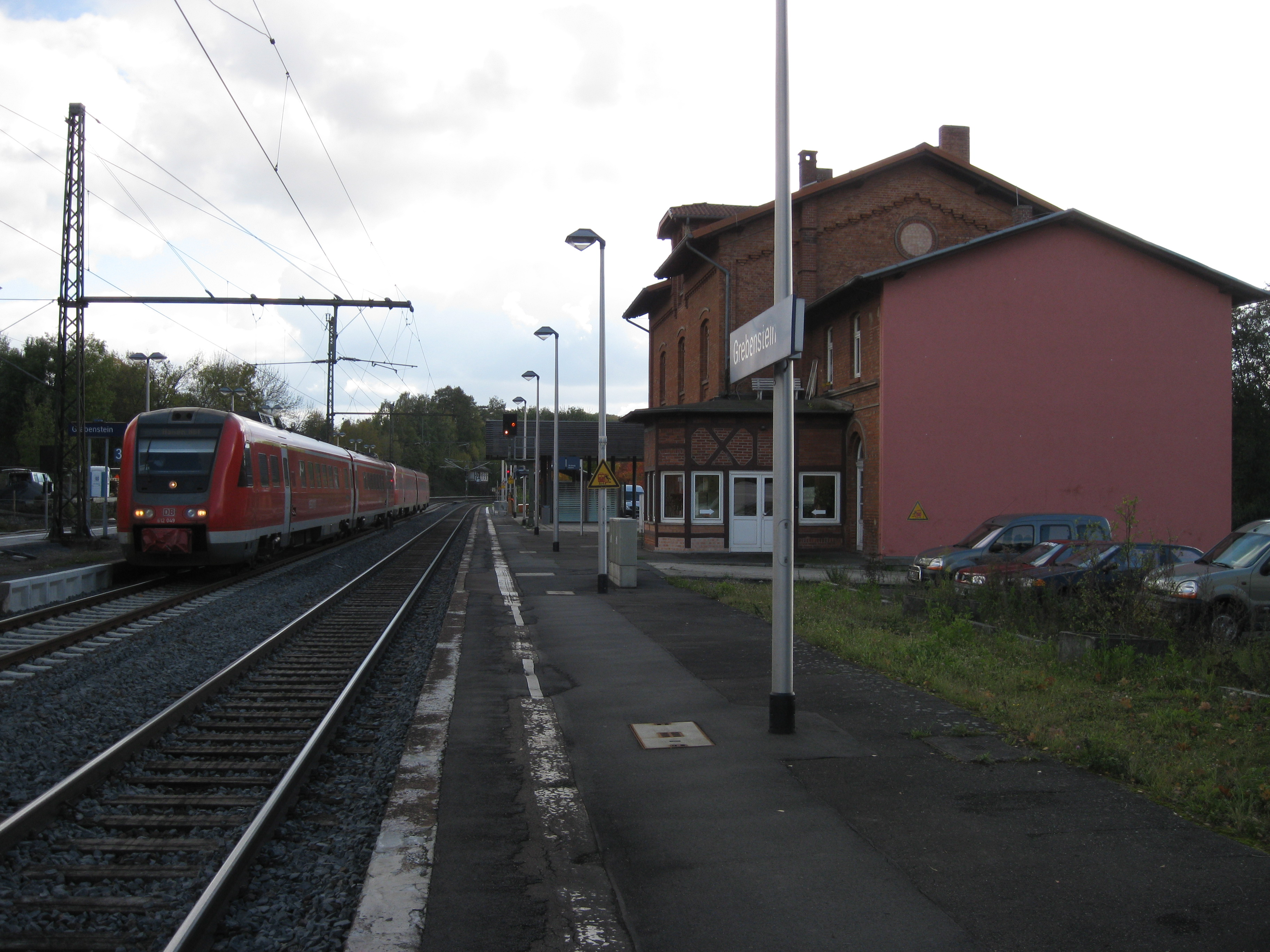 Banegården i Grebenstein, Tyskland